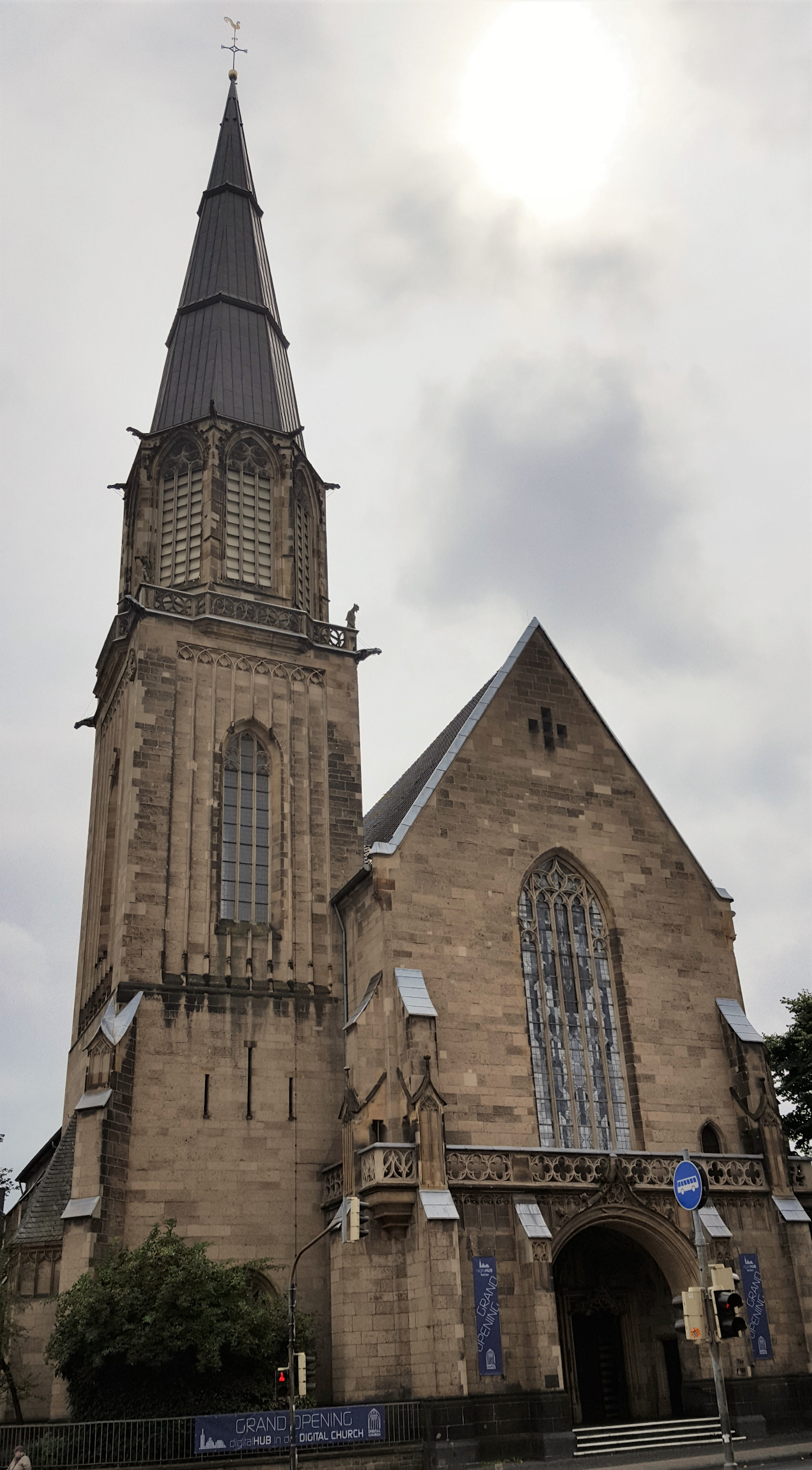 Kirche St. Elisabeth von der Jülicher Straße aus (2017)